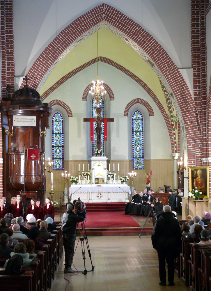 Rīgas Svētā Jēkaba katedrāles centrālā eja un centrālais altāris. 2010. gada Lieldienu ekumēniskais dievkalpojums. .